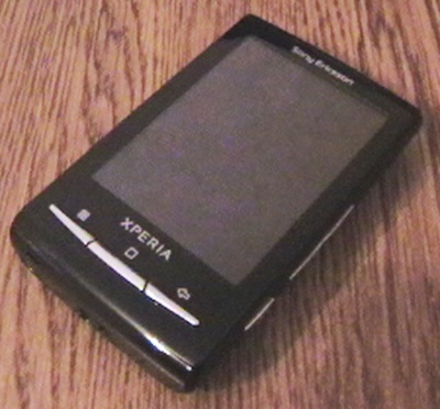 Внешний вид телефона Sony Ericsson Xperia X10 Mini